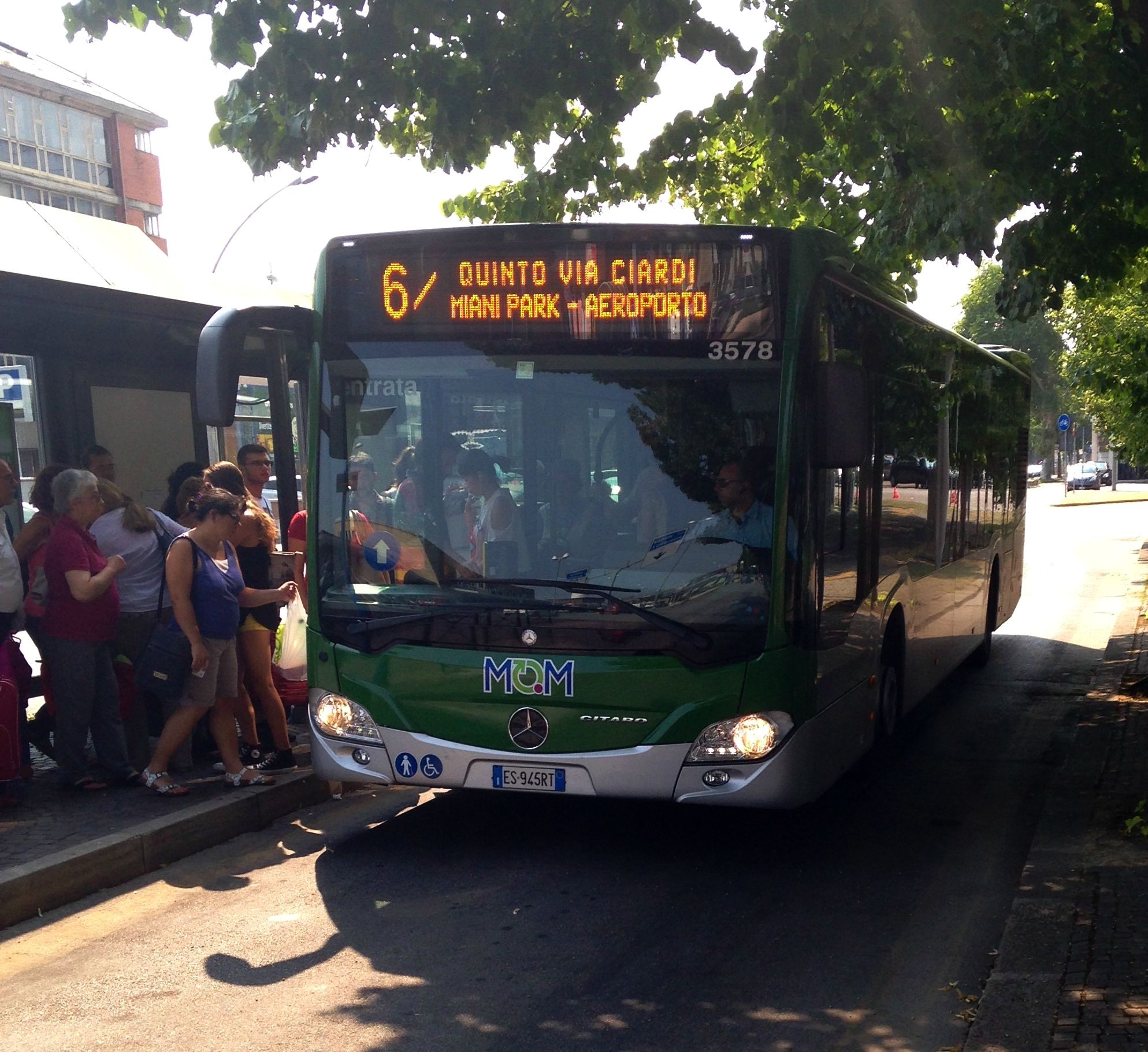 Autobus 3578 Mercedes-Benz Citaro O530BZ di MOM-Mobilità di Marca (ex ACTT) Treviso, presso Capolinea Treviso Stazione FS De Gasperi in Treviso, in servizio urbano sulla Linea 6/, diretto a Quinto di Treviso, via Ciardi, per Miani Park, per Aeroporto "A. Canova".